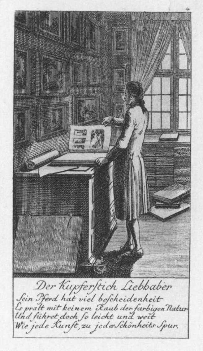 Zwölf Blätter Steckenpferdreiterei. (Beigaben zum Lauenburger genealog. Kalender. 1781). (Beschreibung lt. Quelle) Blatt 1 Blatt 2 Blatt 3 Blatt 4 Blatt 5 Blatt 6 Blatt 7 Blatt 8 Blatt 9 Blatt 10 Blatt 11 Blatt 12 der Serie